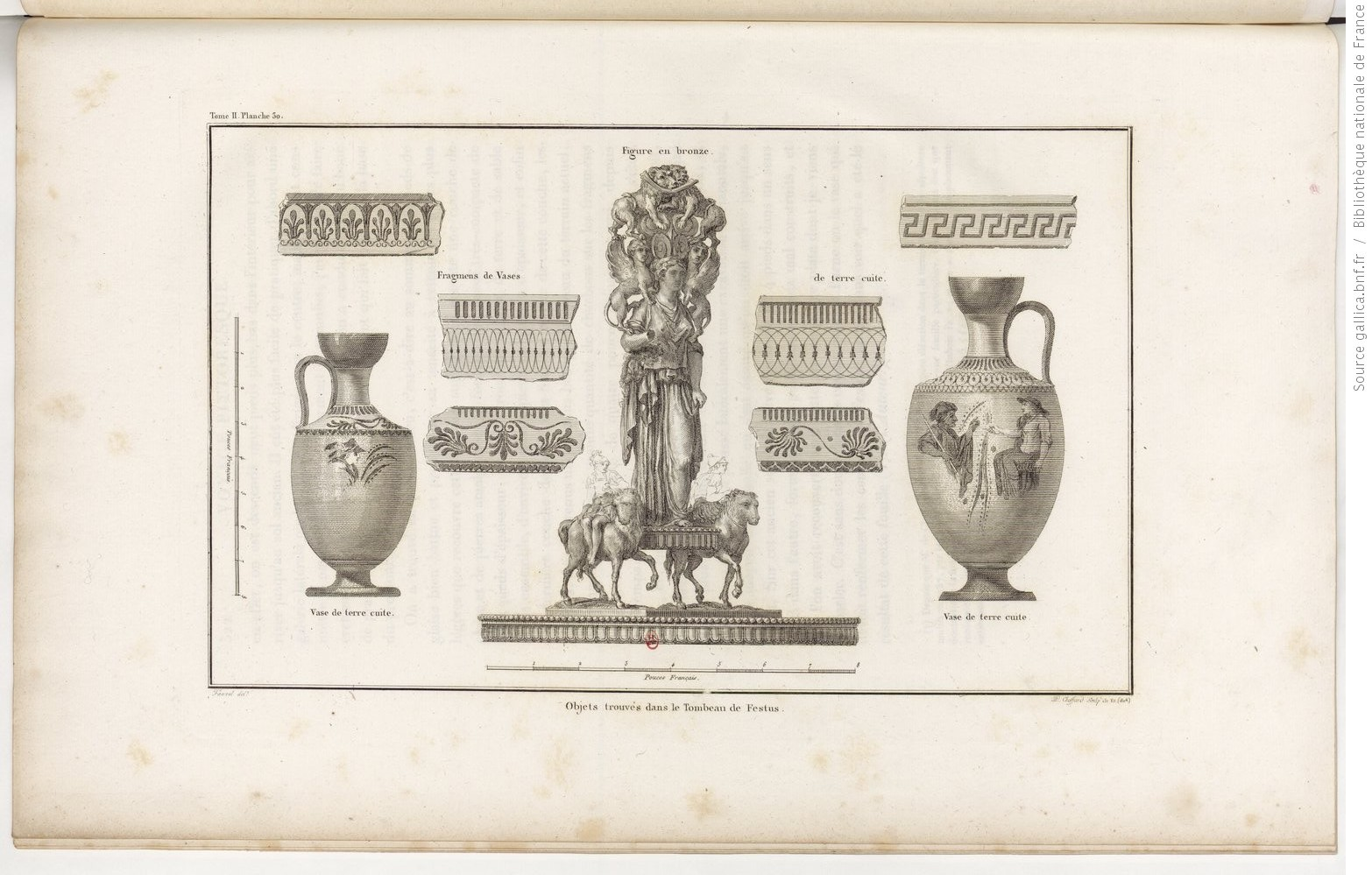 Dessins de divers objets découvert en Troade dans le tombeau de Festus